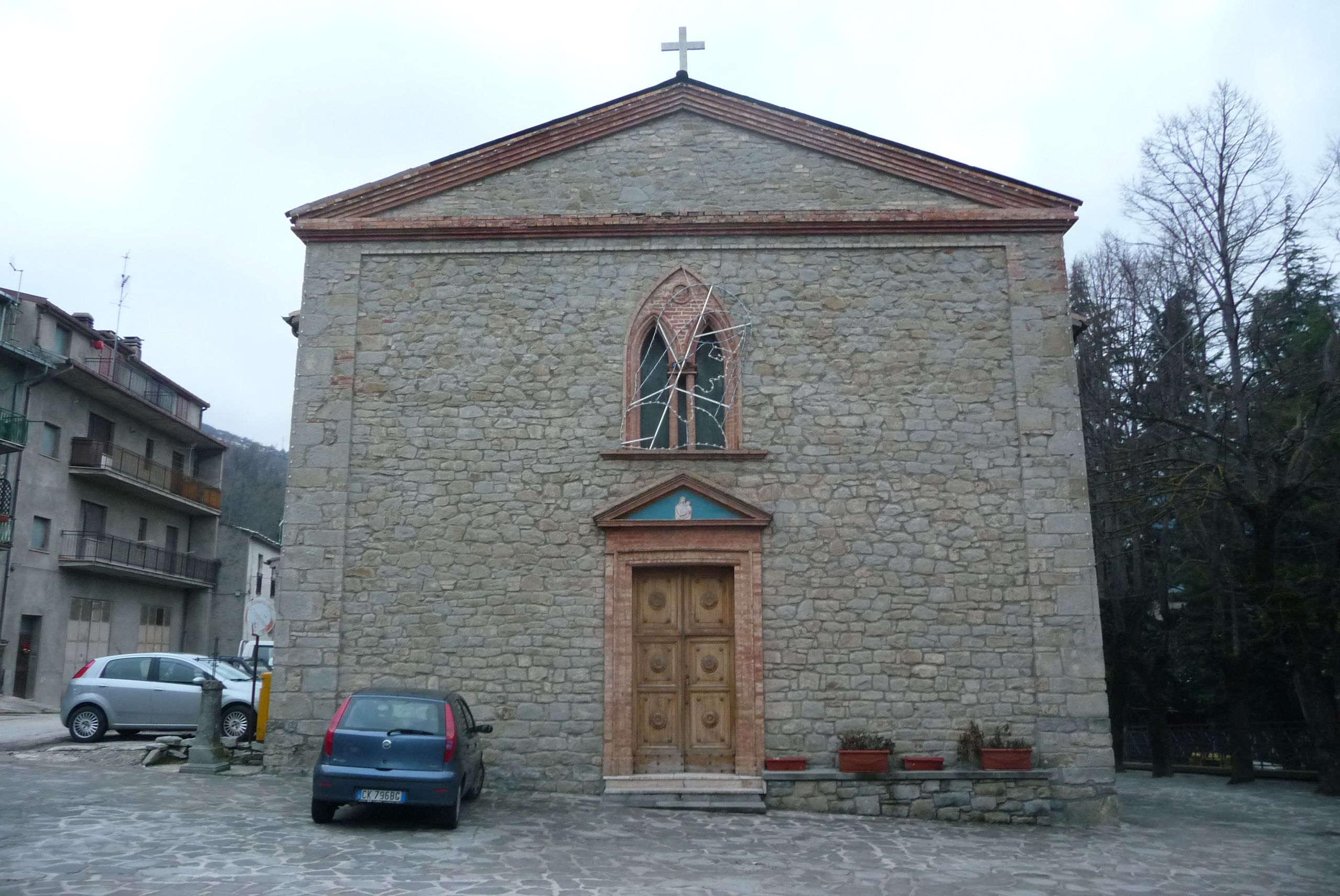 Foto chiesa parrocchiale di San Pietro e Paolo a Nerito (Crognaleto)